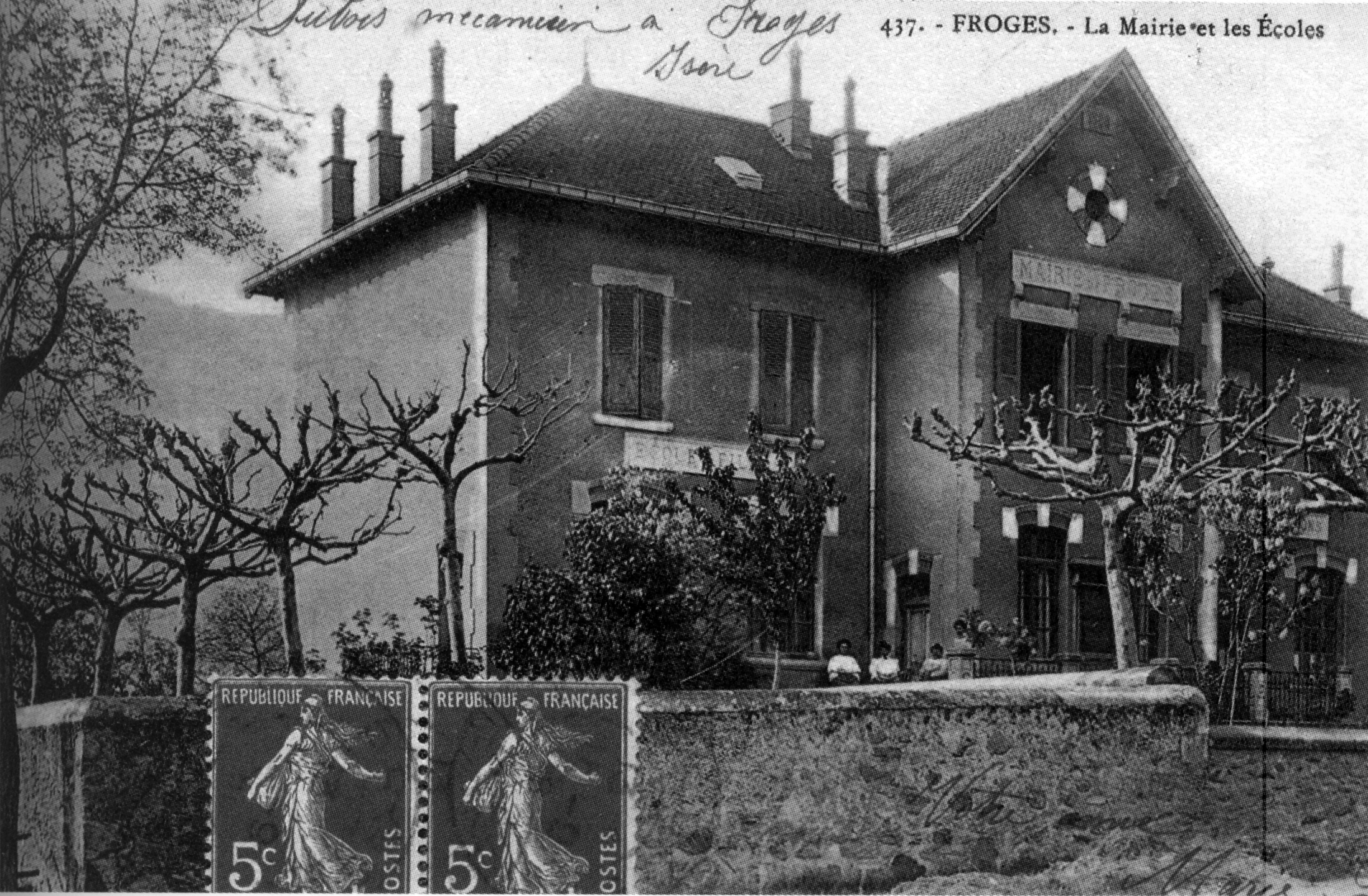 Froges, la mairie et les écoles en 1910